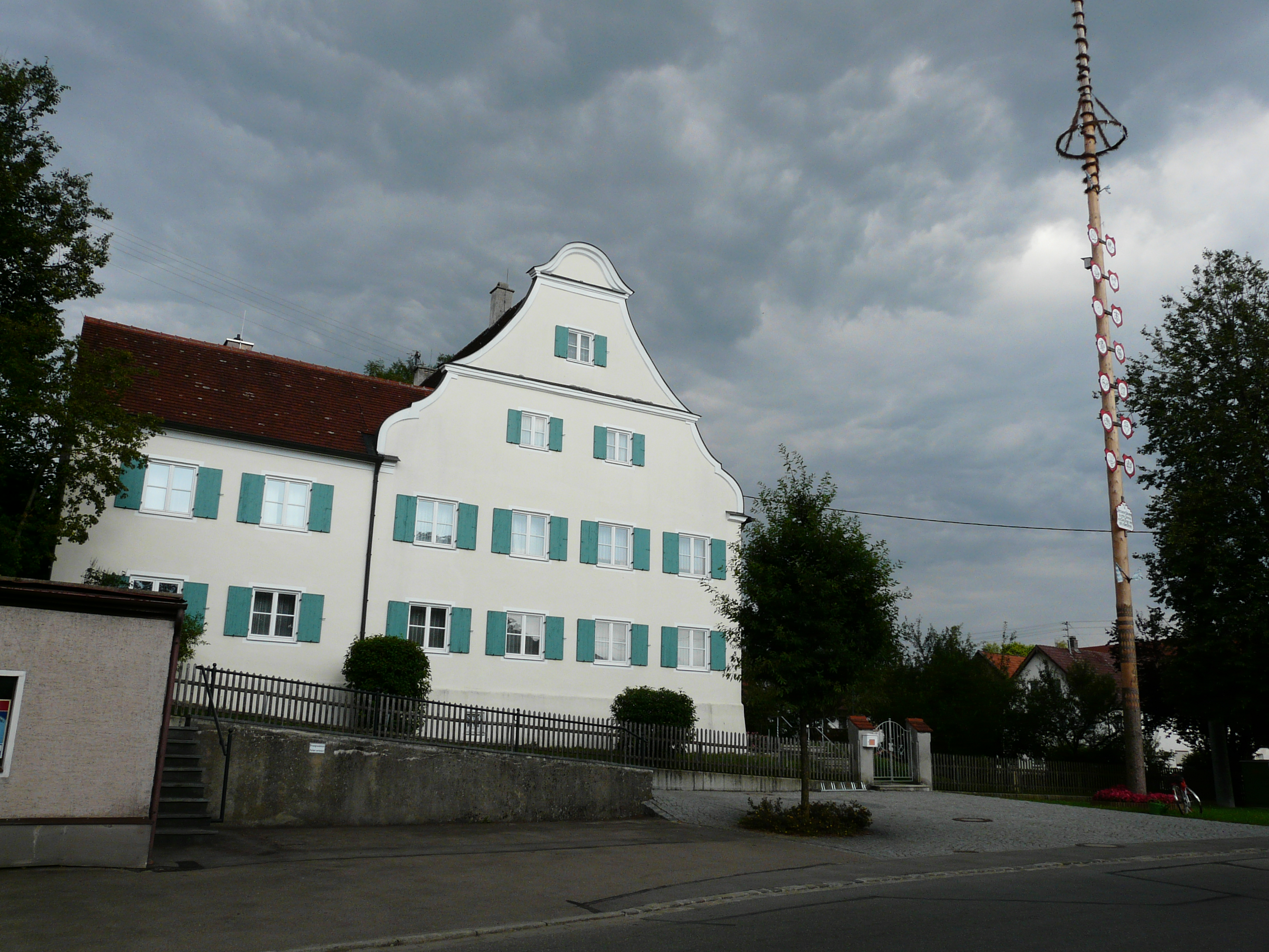 Pfarrhof in Eppishausen